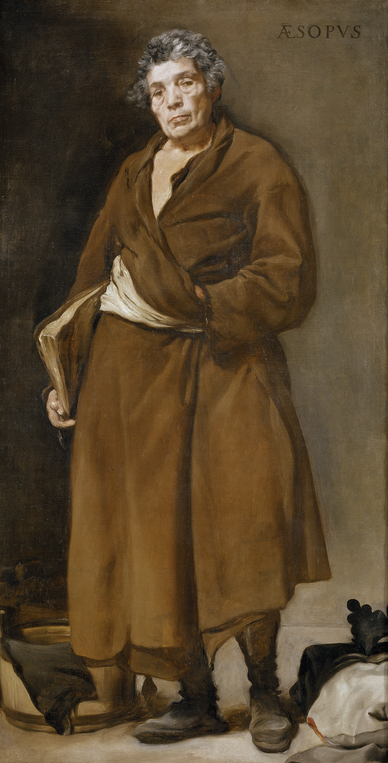 La obra representa al fabulista griego Esopo, y fue realizada por el pintor sevillano Diego Velázquez hacia el año 1638.